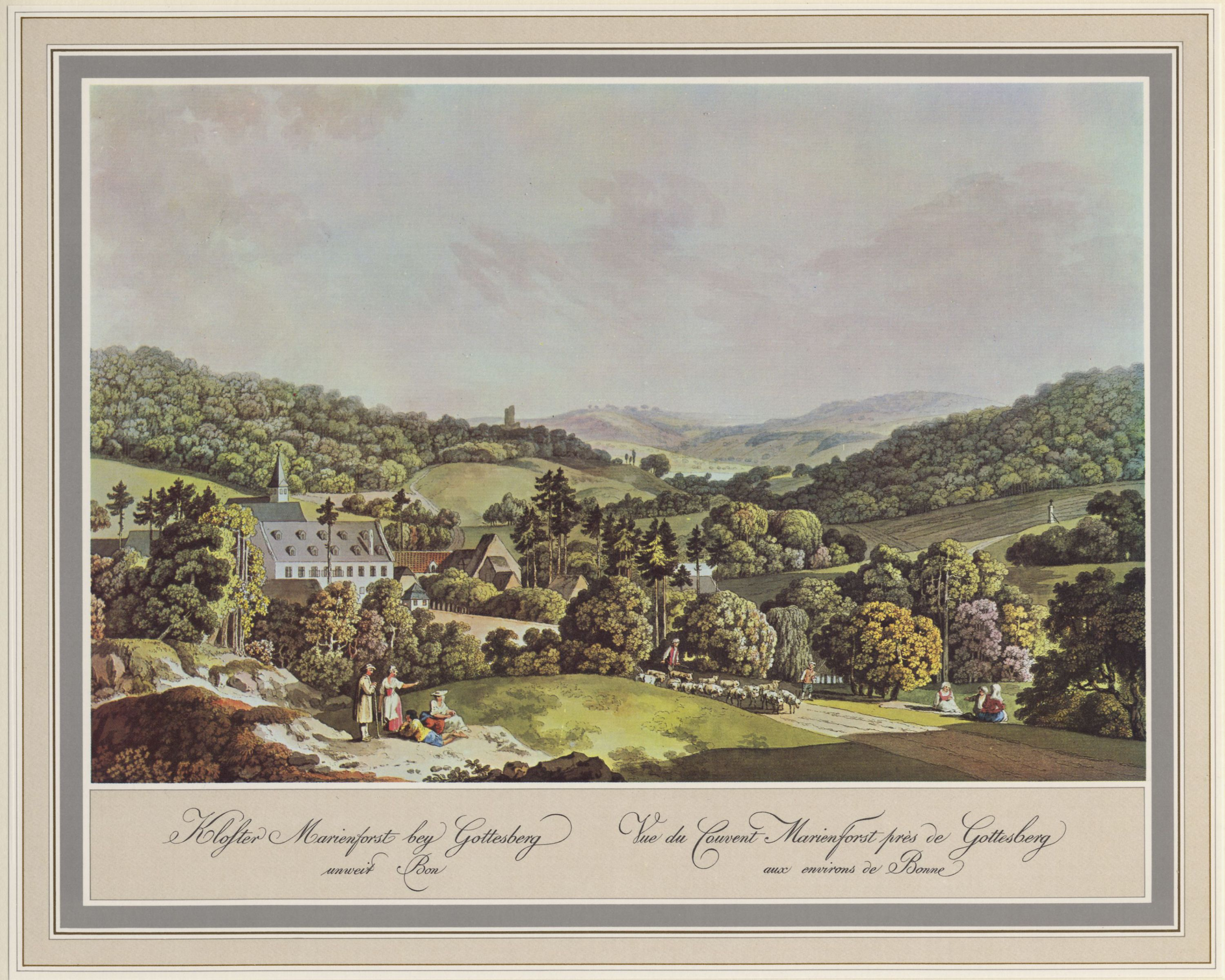 Bonn, Kloster Marienforst bei Bad Godesberg; Kupferstich, aquarelliert, aus: »Fünfzig malerische Ansichten Rhein-Stroms von Speyer bis Düsseldorf«, erschienen bei Artaria in Wien 1798; nach Aquarellen von Laurenz Janscha, die im Sommer 1792 entstanden